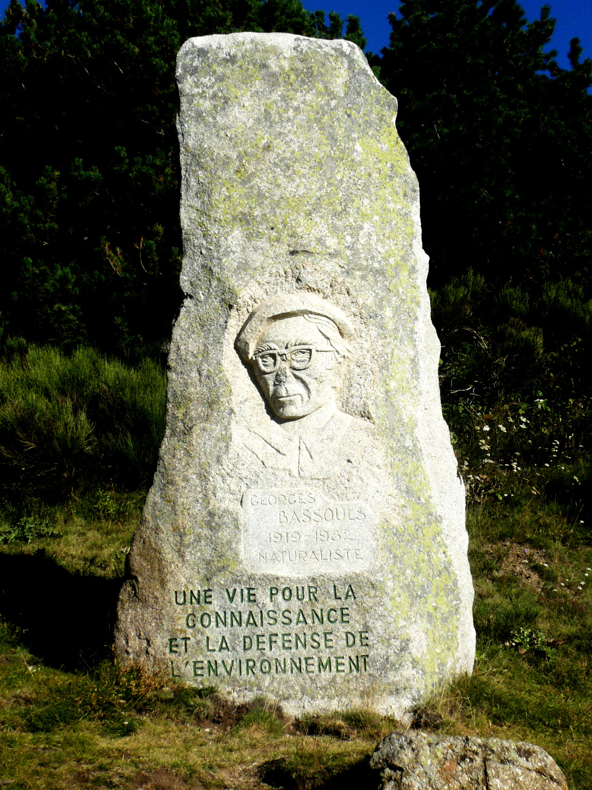 Granit au col de Mantet en mémoire de Georges Bassouls, 1919 1982, Naturaliste à l'origine de la création des réserves naturelles de Mantet, Py et Prats-de-Mollo